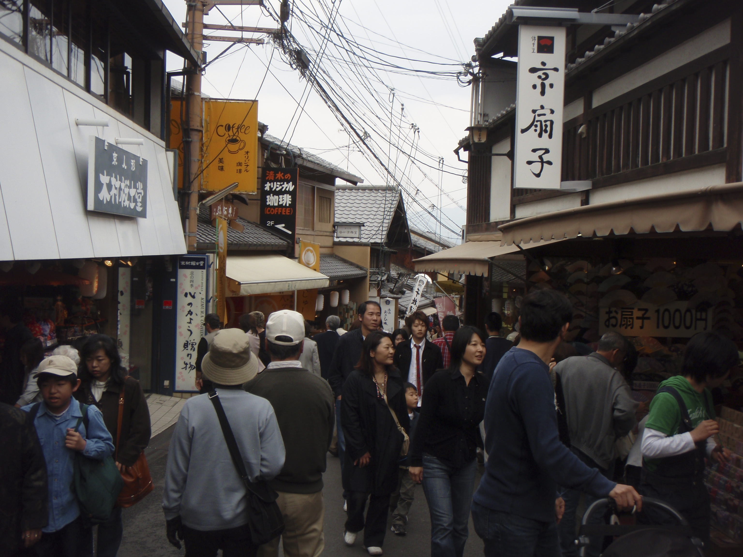 清水道・松原通（京都市東山区清水1丁目263、清水寺門前近く、京人形の「木村桜士堂」本店付近）